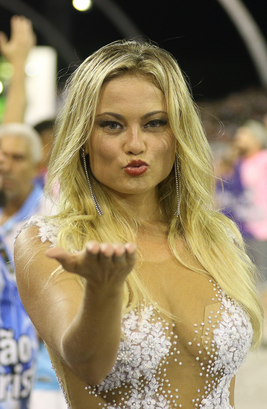 Rosas de Ouro